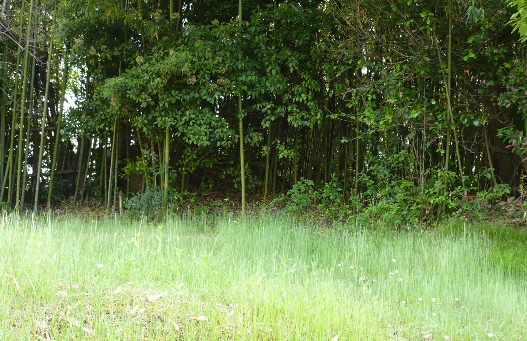 東側にある土塁跡